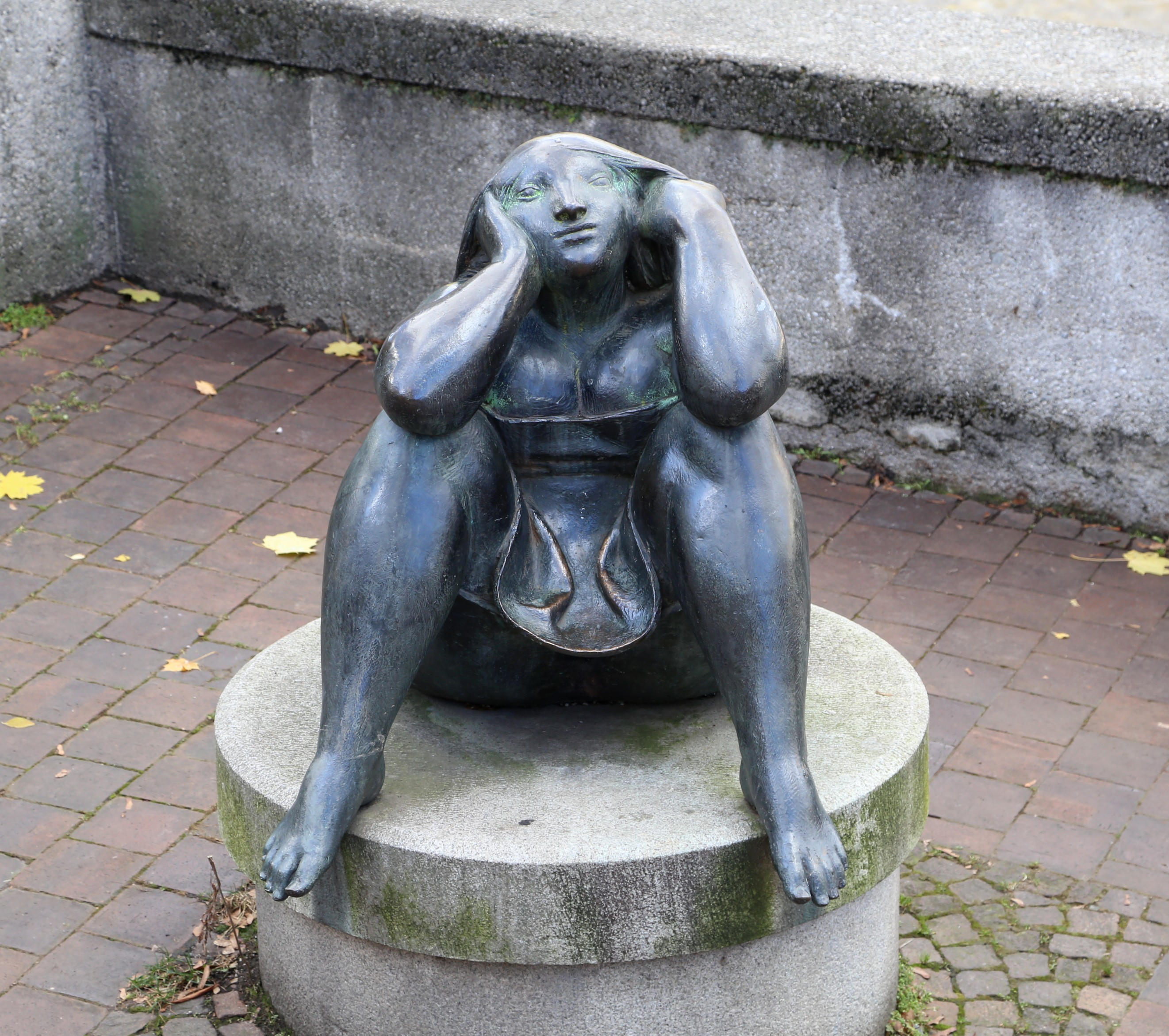 Martin Mayer: Bukolika, 1984, Bronze, Ludwigsbrücke, München